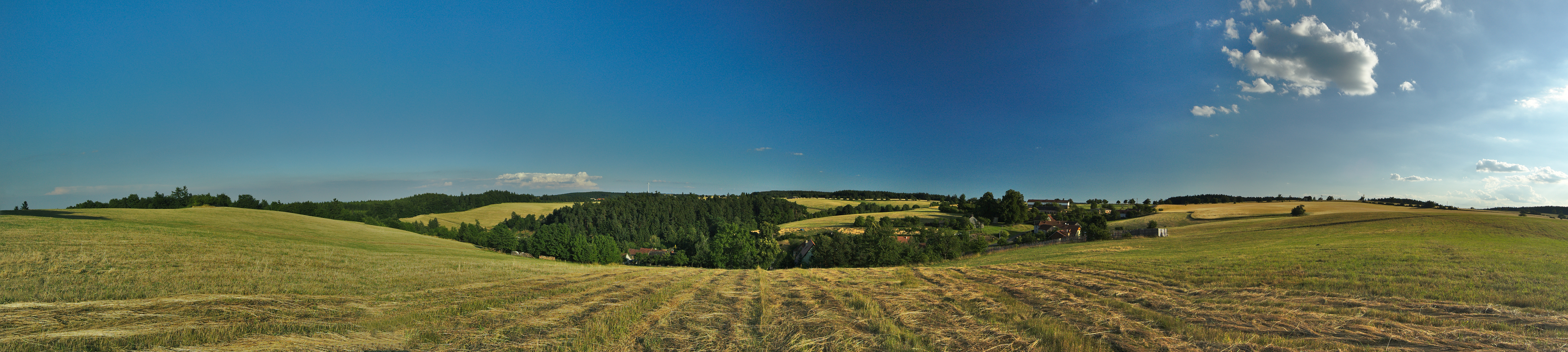 Pohled na obec ze severu, Repechy, Bousín, okres Prostějov